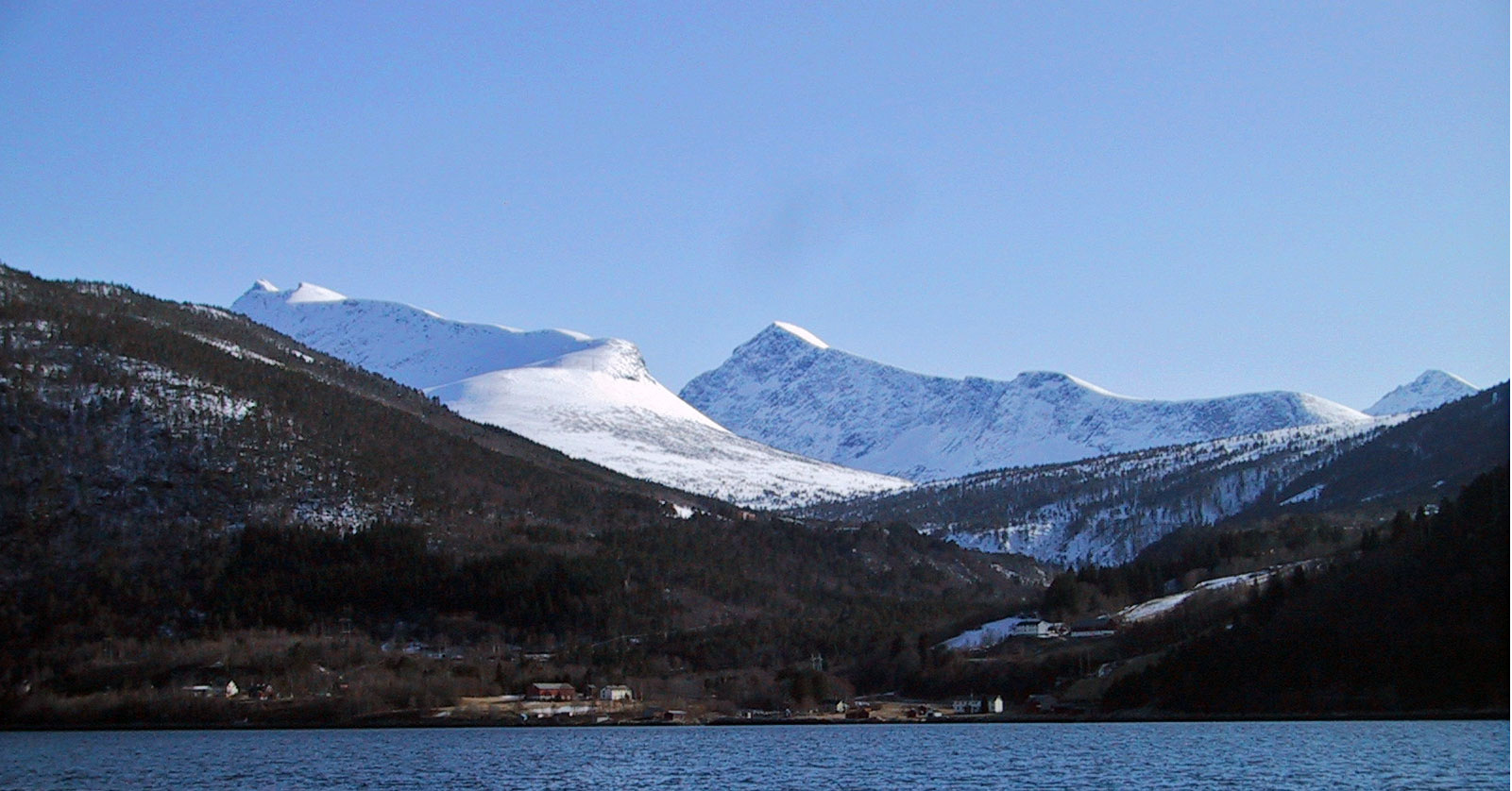 Jordalsgrenda, Sunndal kommune